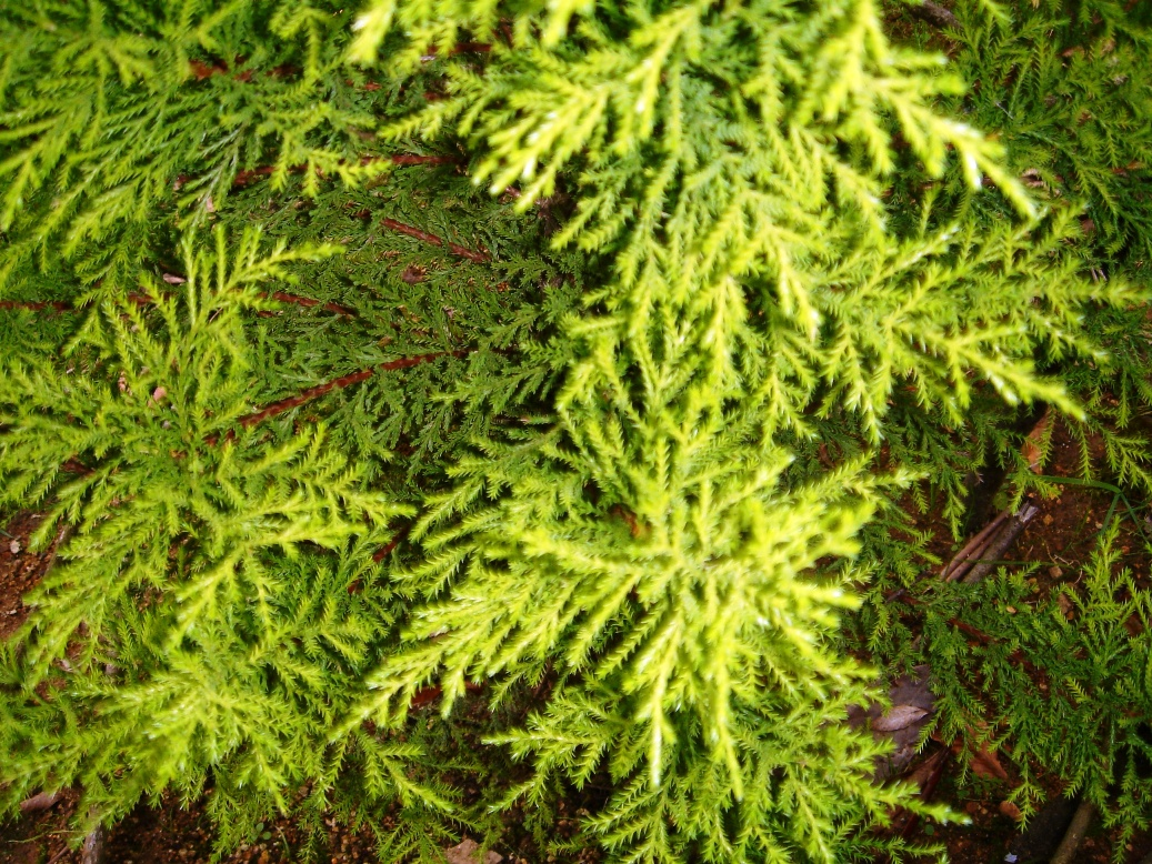 Cupressus macrocarpa cv. 'Goldcrest'